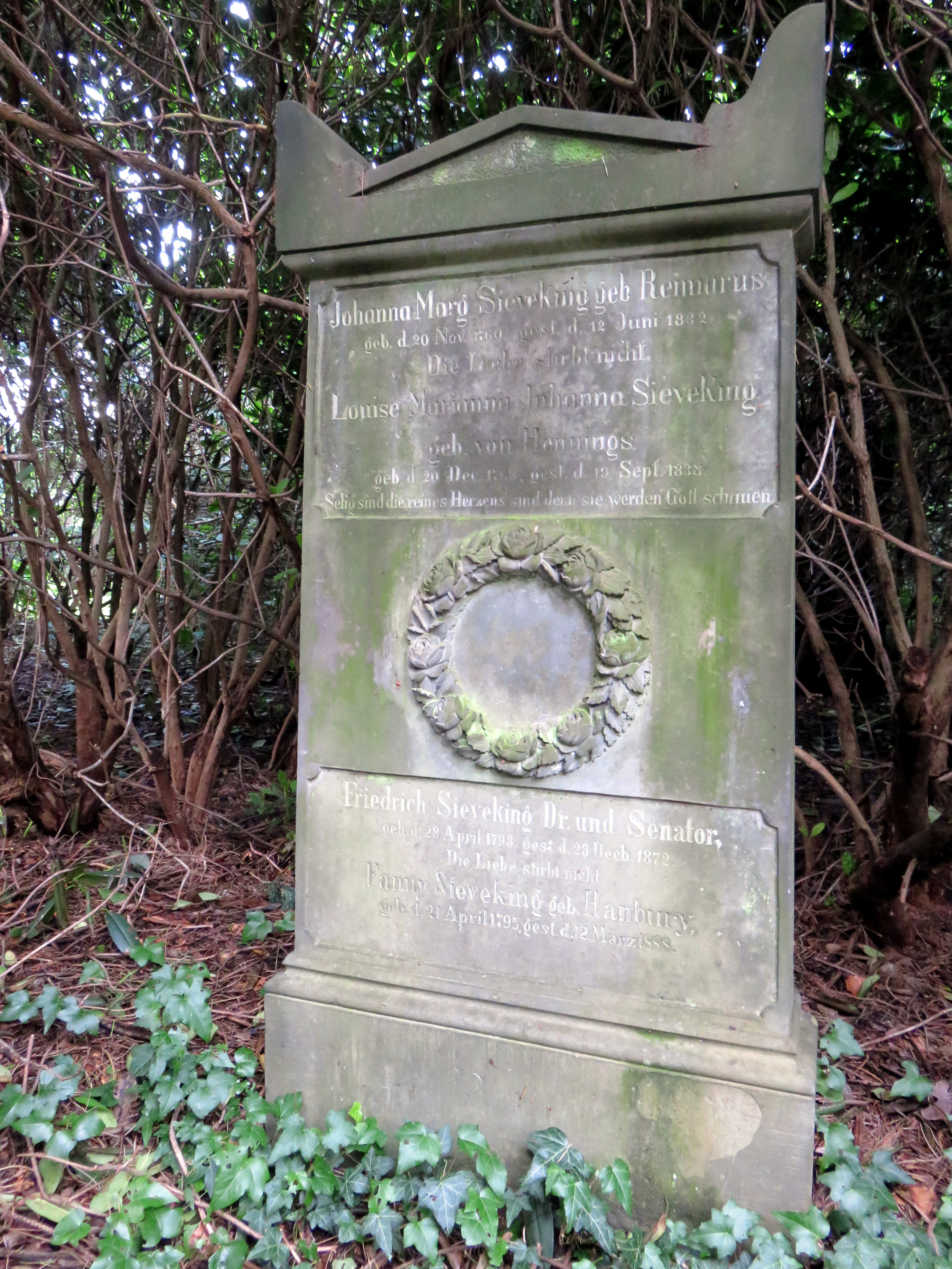 Grabstein für die Hamburger Aufklärerin und Unternehmerin Johanna Margaretha Sieveking (Ehefrau des Hamburger Kaufmanns Georg Heinrich Sieveking) in der Sieveking-Familien-Grabanlage auf dem Hamburger Friedhof Ohlsdorf, Planquadrat S 25 / S 26. Details, Historisches Foto, Inschrift bei Eberhard Kändler: Begräbnishain und Gruft. Die Grabmale der Oberschicht auf den alten Hamburger Friedhöfen. Christians Verlag, Hamburg 1997, ISBN 3-7672-1294-3, S. 127.